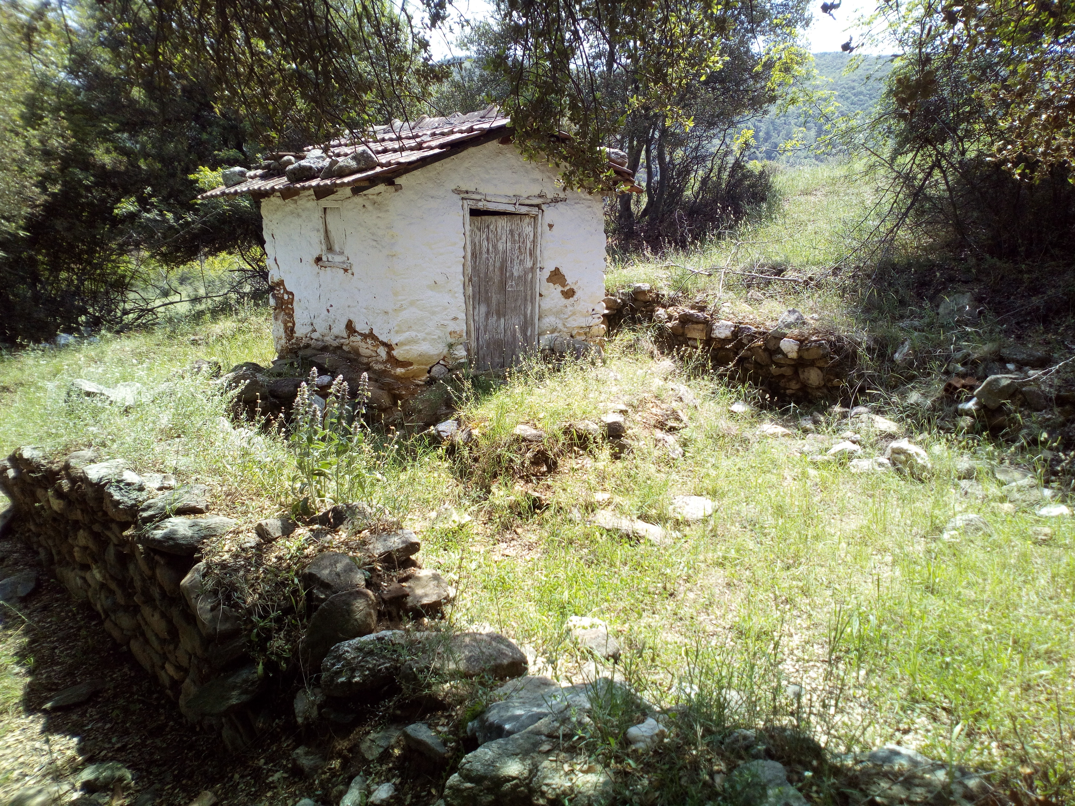 Παλιό εκκλησάκι στον λόφο νότια του χωριού.